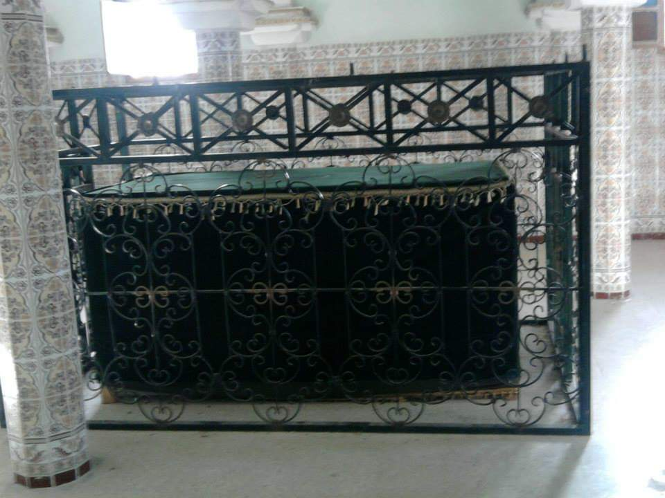 Aaaaa